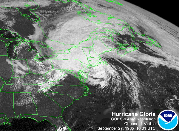 Hurricane Gloria